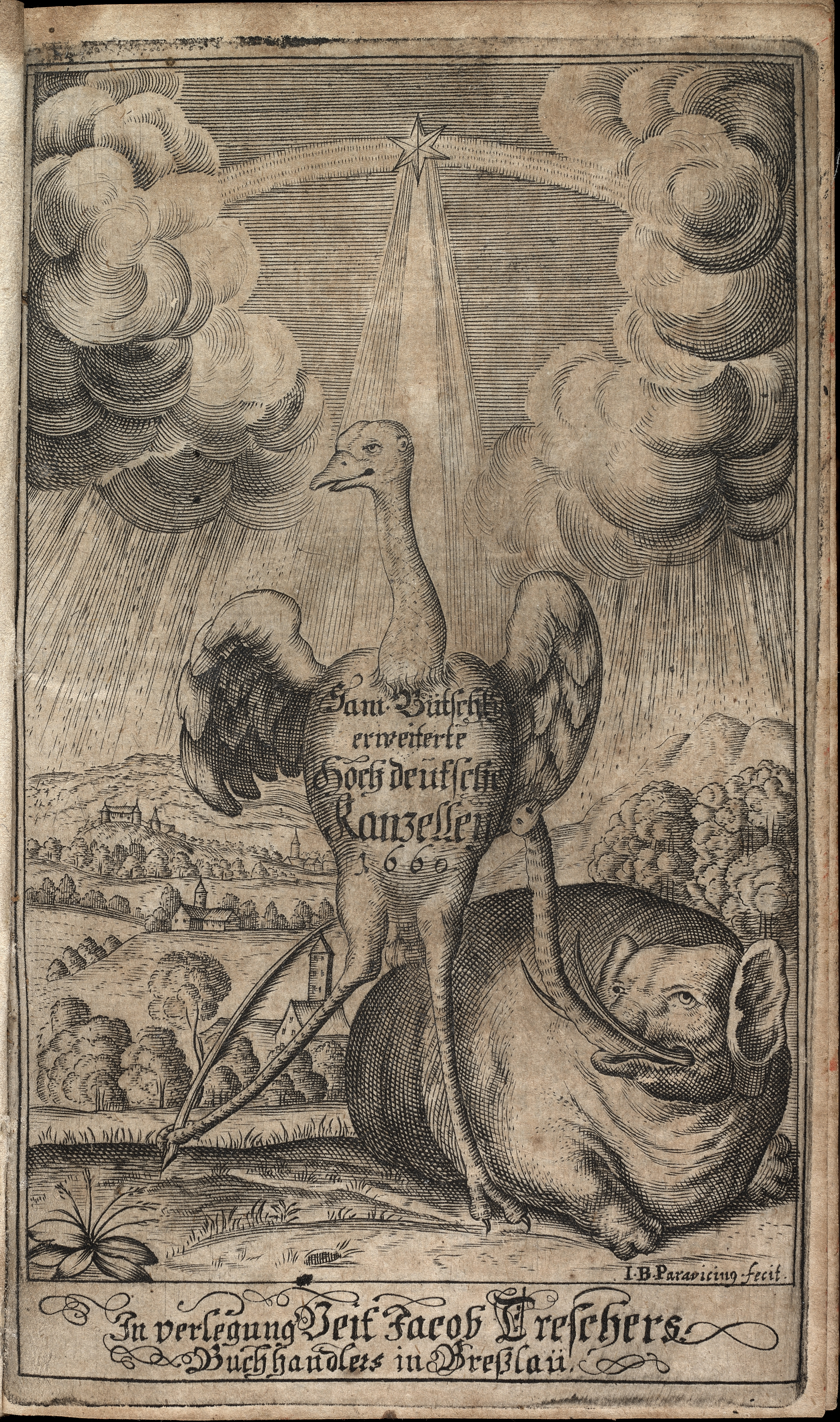 I.B. Parvicinus Erweiterte Hochdeutsche Kanzelley. Titelkupfer, aus: Samuel Butschky, a-z! Sam. […] Zeitz, Christoph Cellarius/Veit Jakob Trescher, 1659/60. Leipzig, Universitätsbibliothek, 8-B.S.T.127